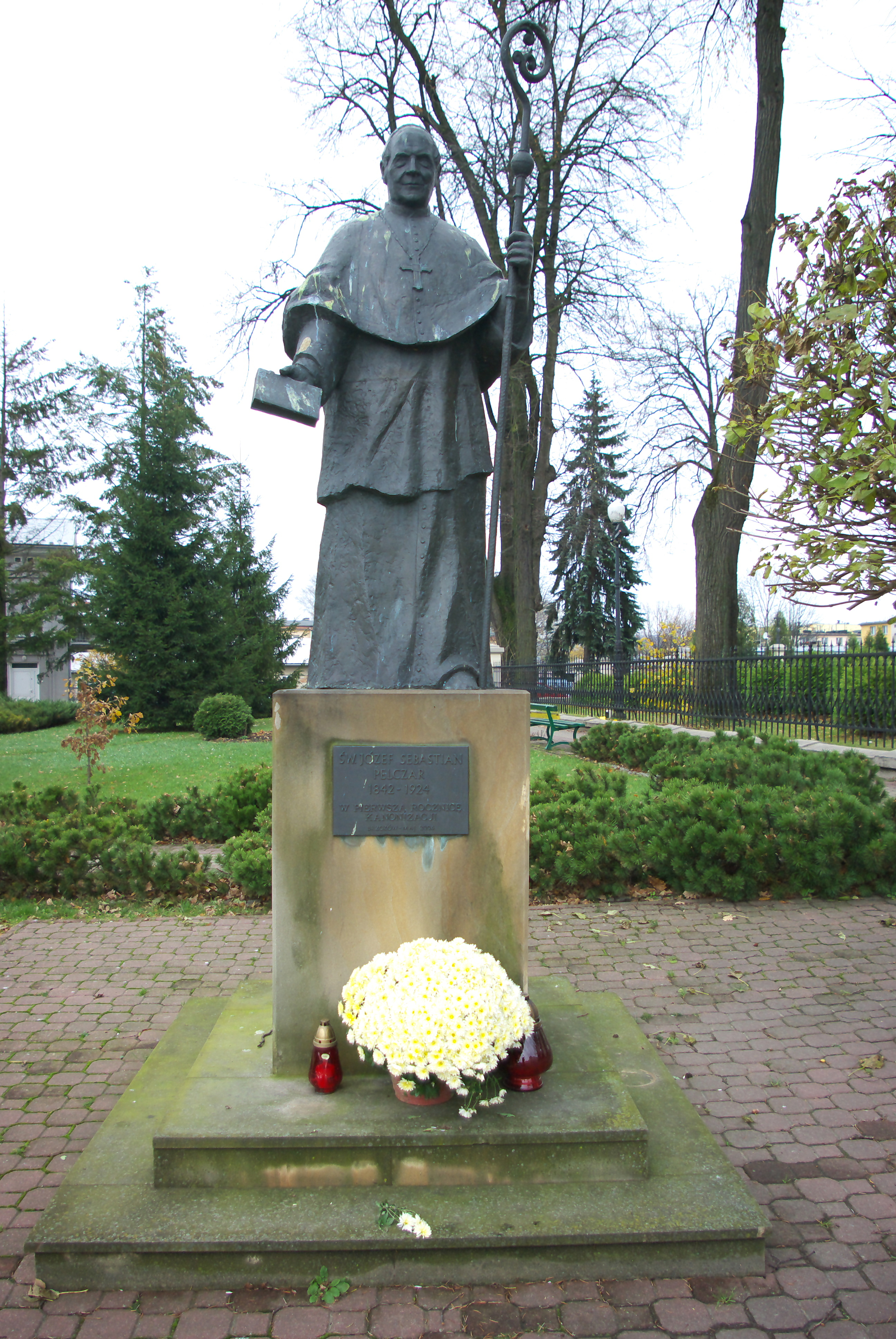 Pomnik Józefa Sebastiana Pelczara w Brzozowie.